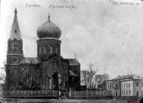 Дербент. "Городской собор"